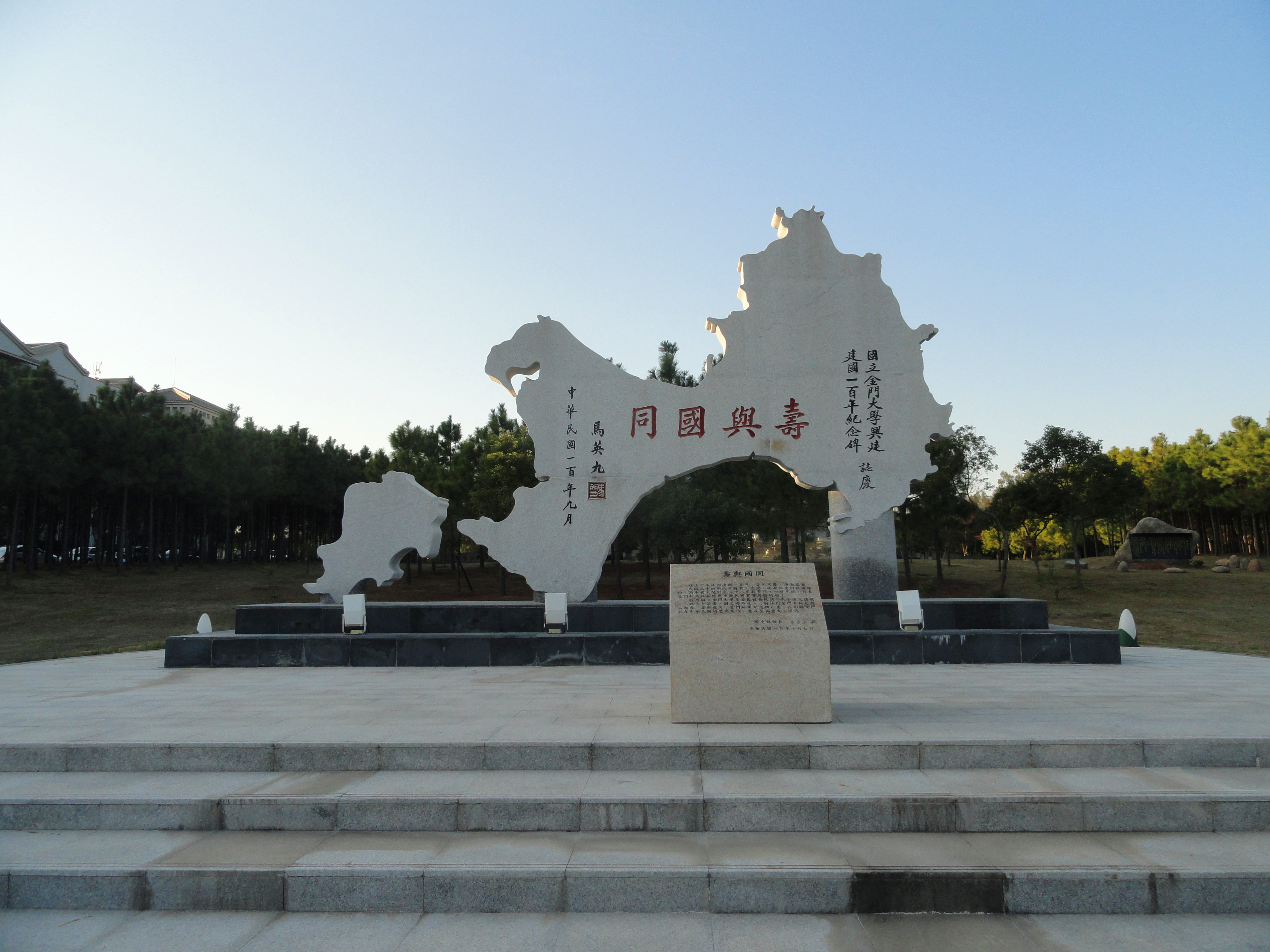 中文（台灣）: 國立金門大學興建中華民國建國一百年紀念碑，金門地圖外形，2011年（中華民國100年）9月中華民國總統馬英九題「壽與國同」四字。中文（中国大陆）: 寿与国同金门地图纪念碑